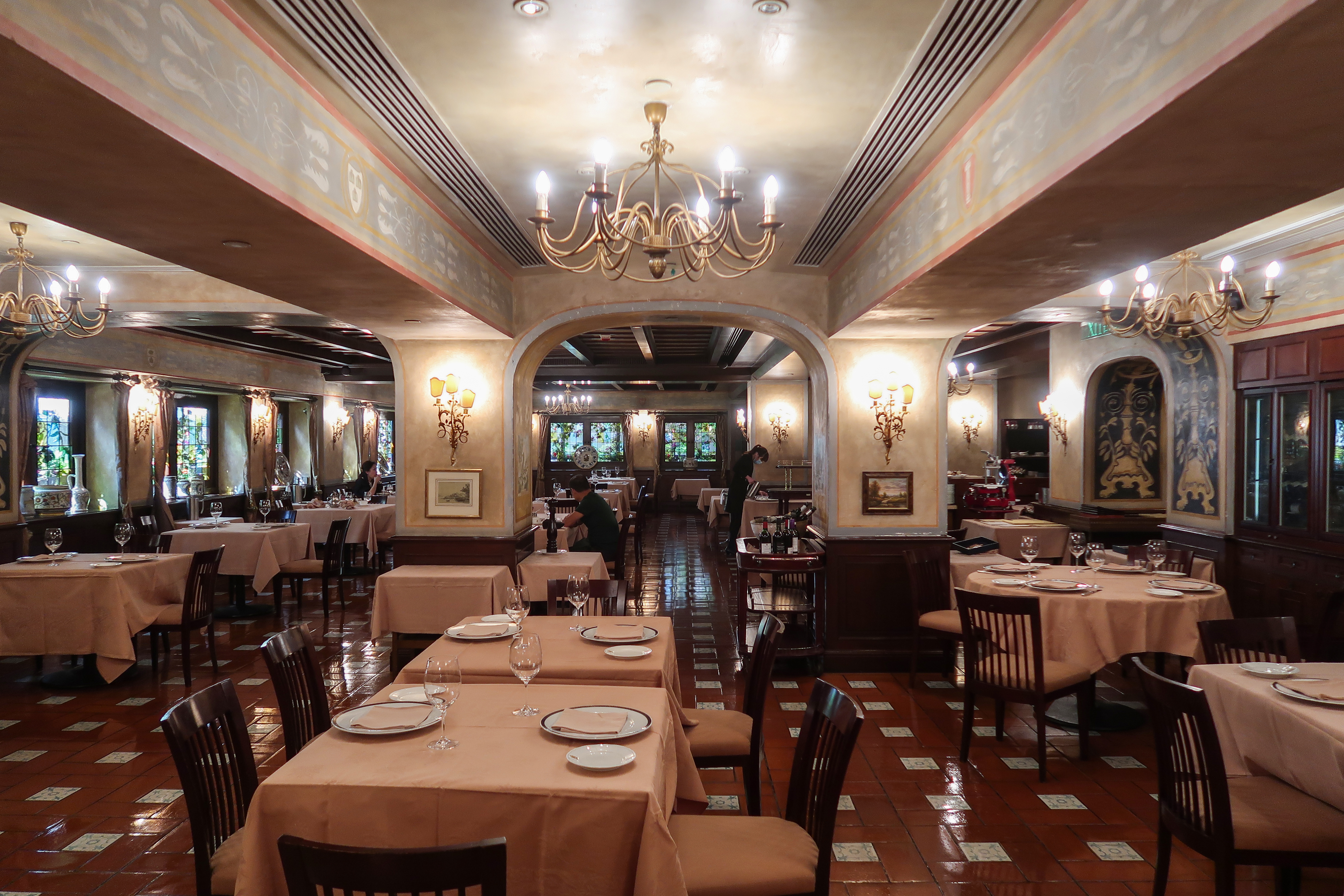 Sabatini Interior